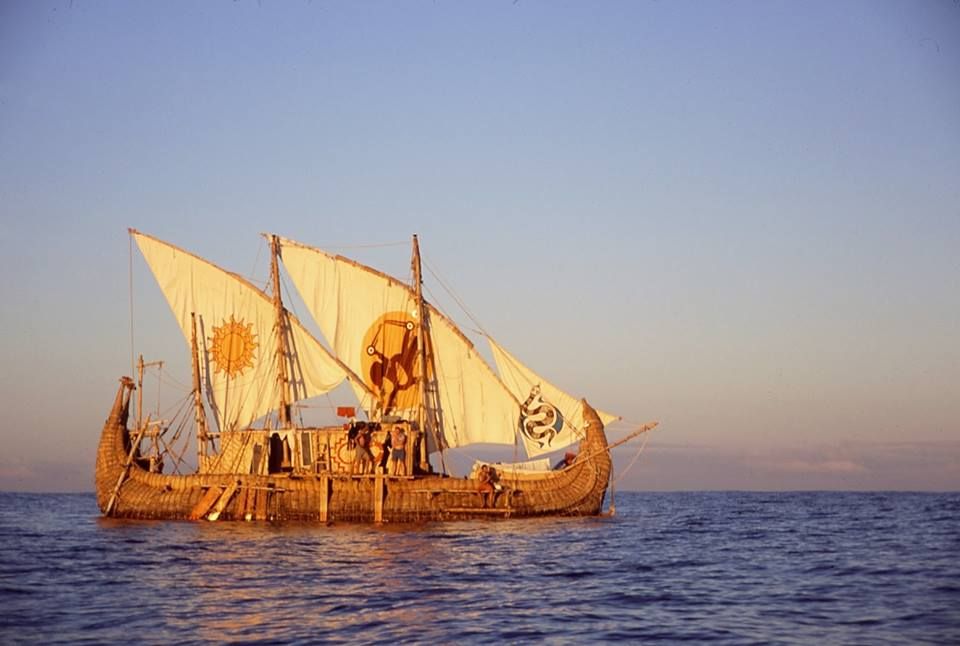 Viracocha II Expedition